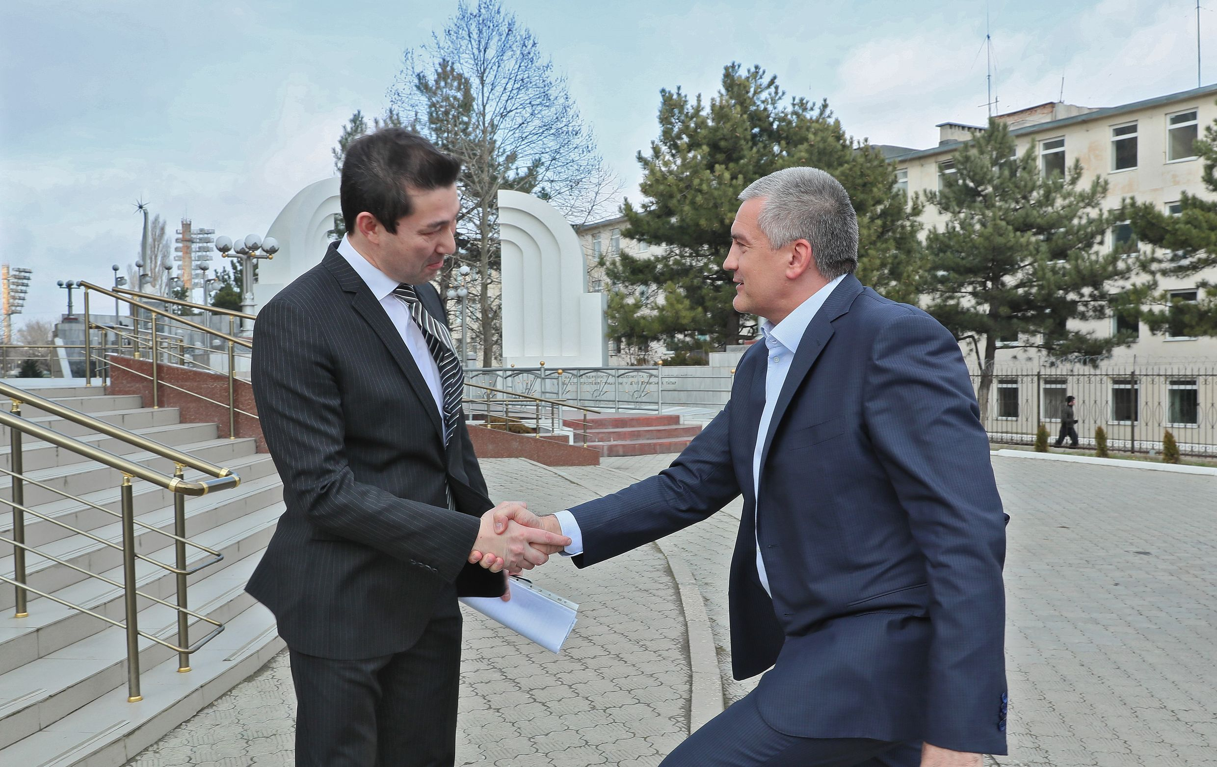 Визит Аксёнова в КИПУ